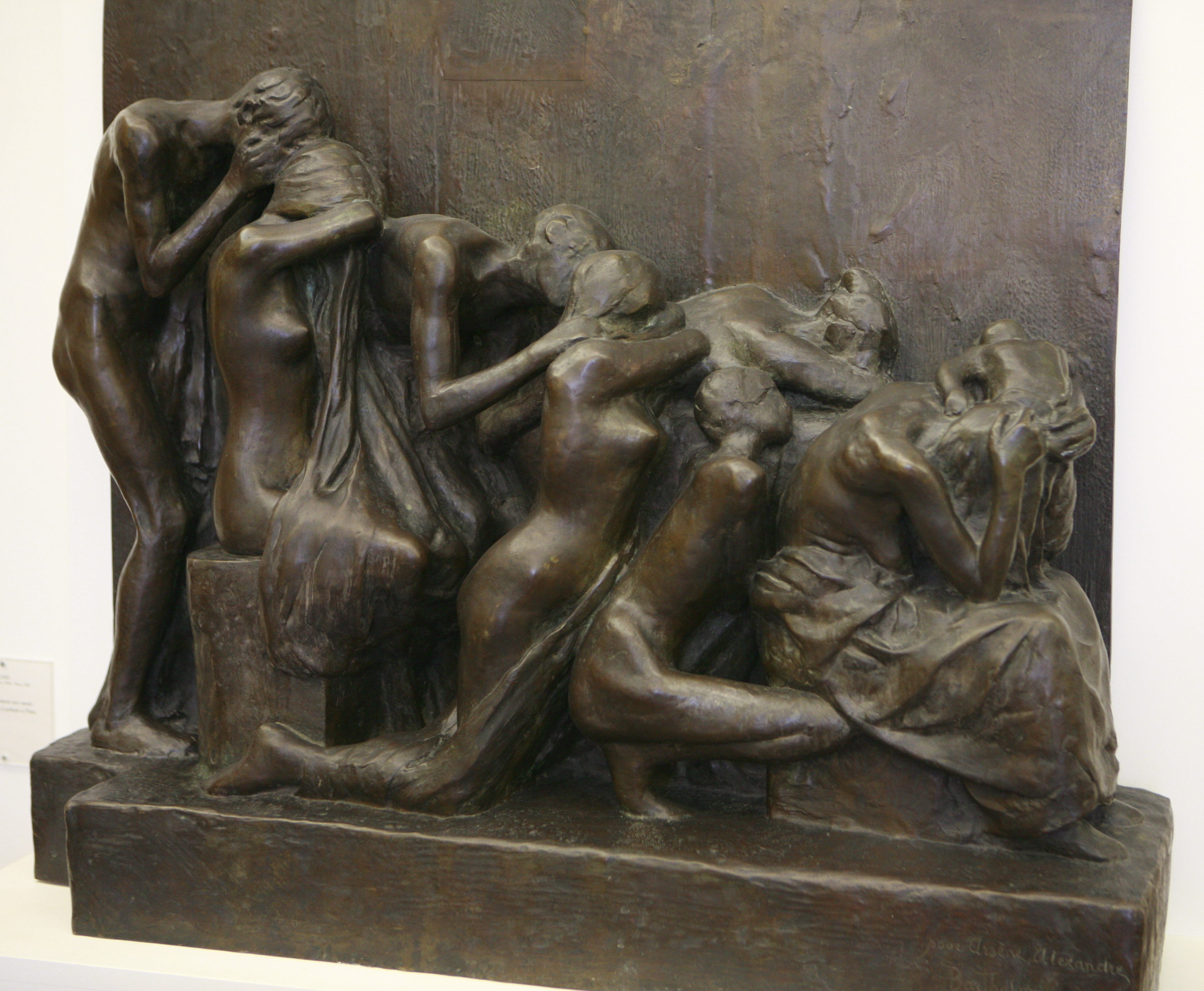 Les Pleureuses, étude pour le monument aux morts du cimetère du Père Lachaise à Paris Albert Bartholomé (1848-1928)